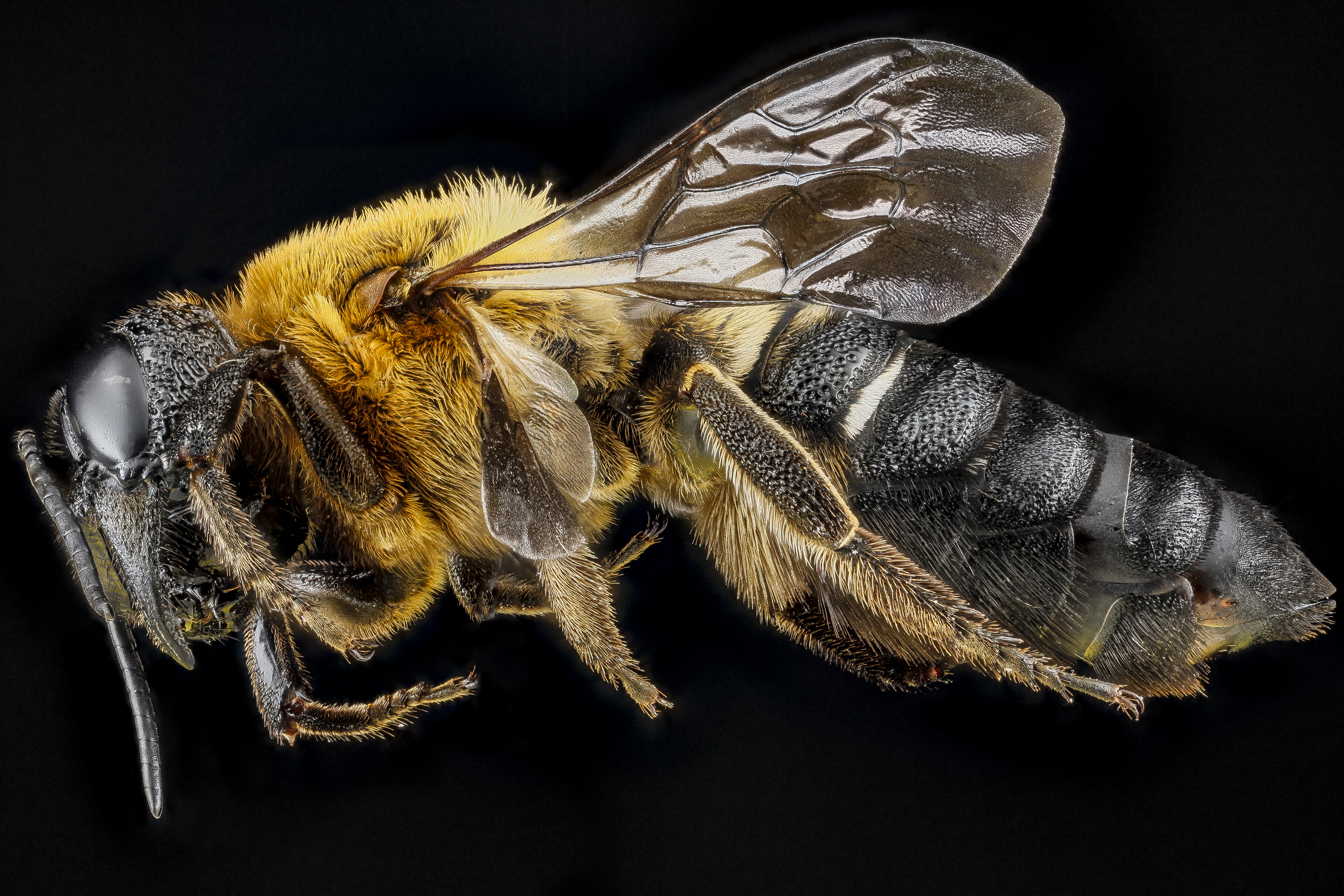 Megachile sculpturalis, female, Maryland